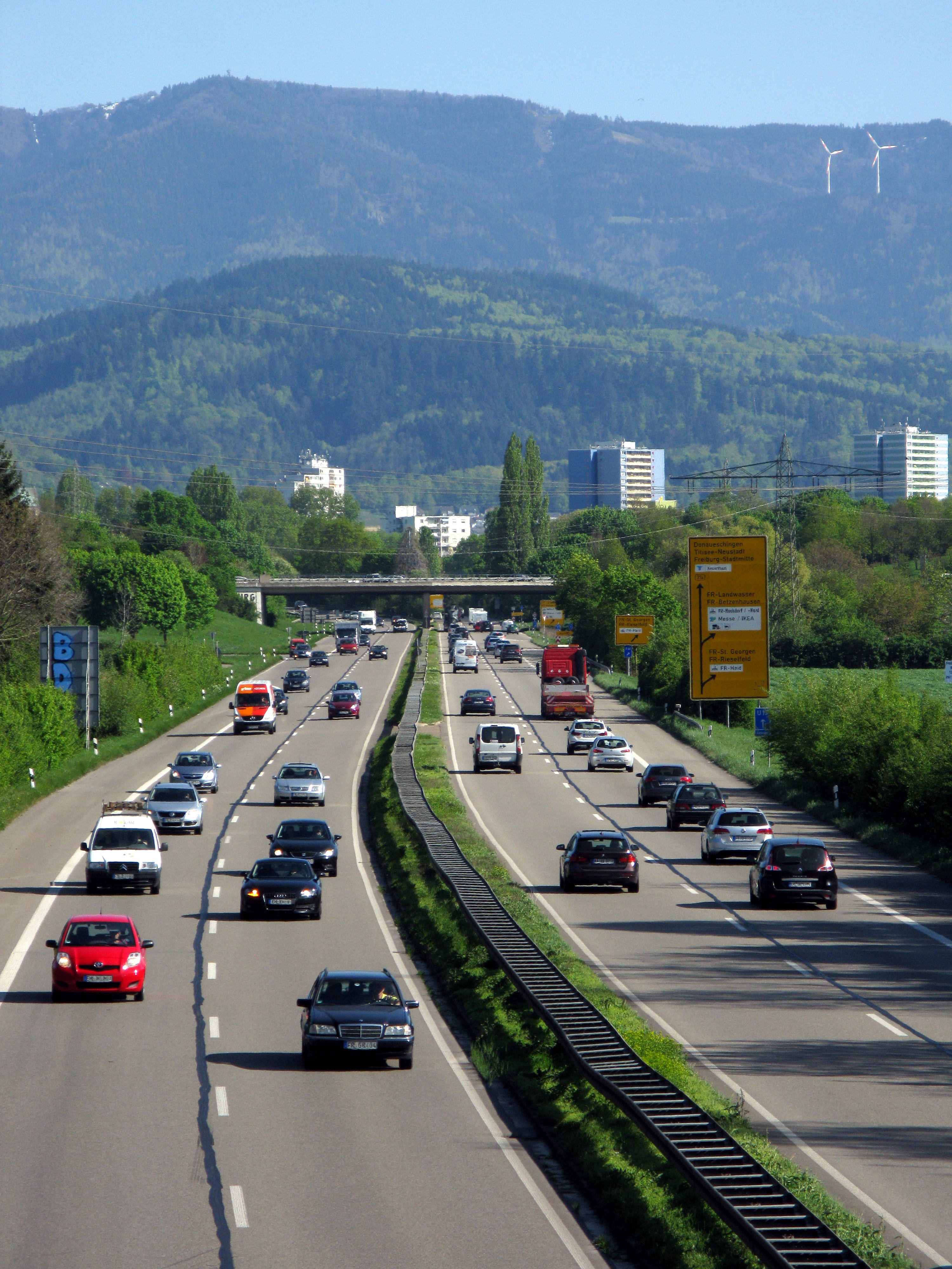 B 31a bei Freiburg-Lehen, Blick nach Osten mit Hochhäusern von Freiburg-Weingarten und dem Schauinsland mit Windrädern